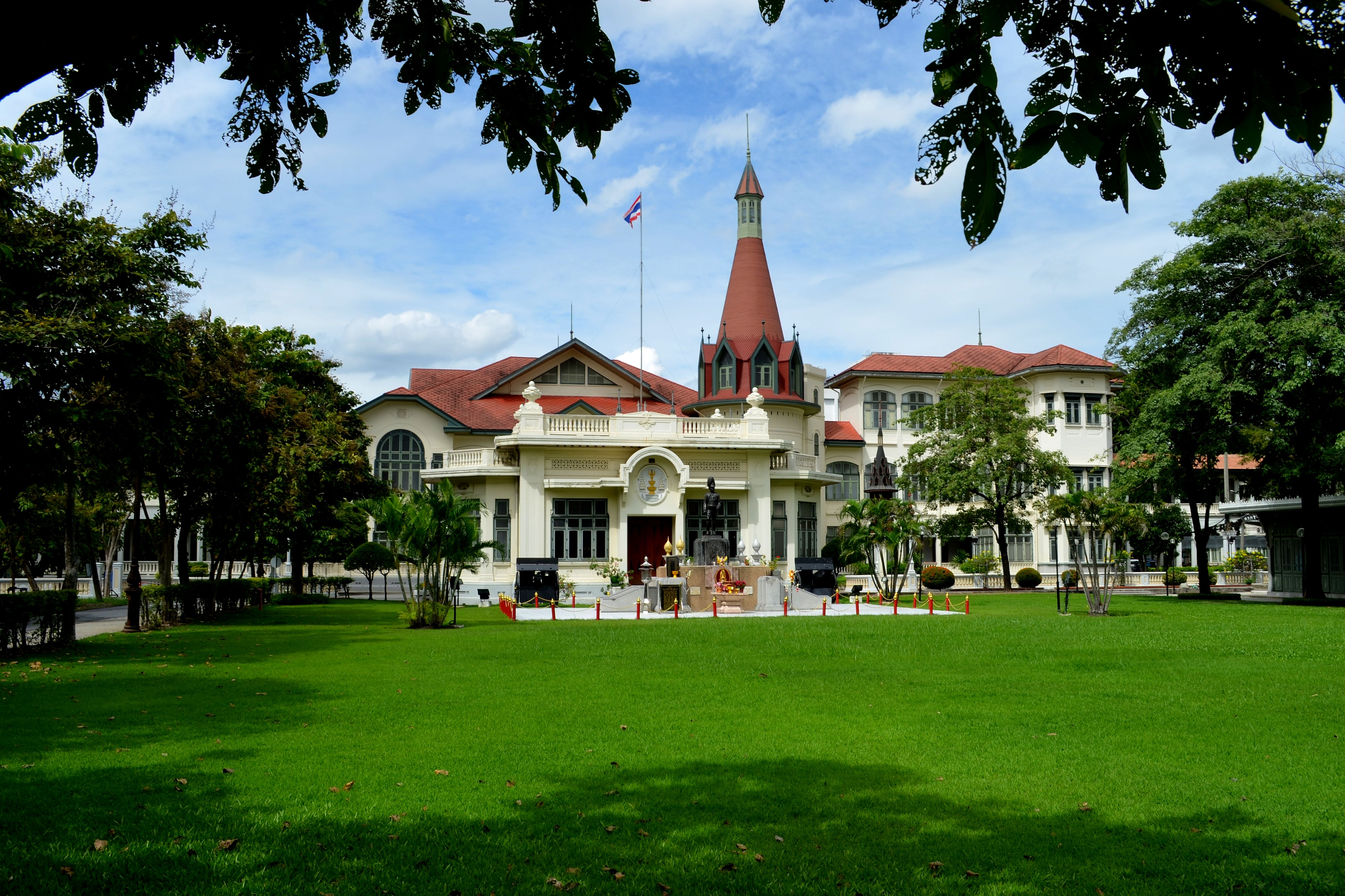 พระราชวังพญาไท